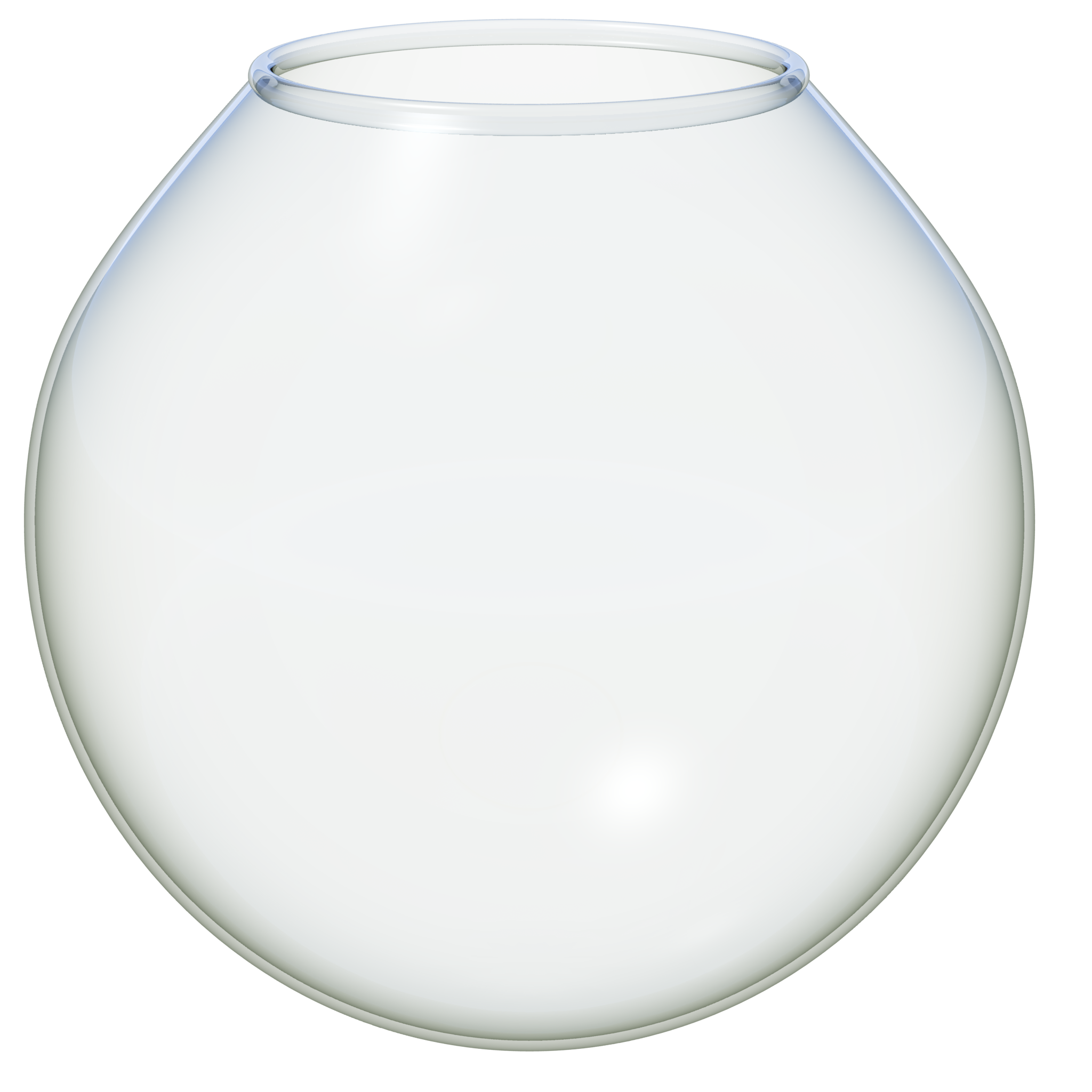 Ein Goldfischglas